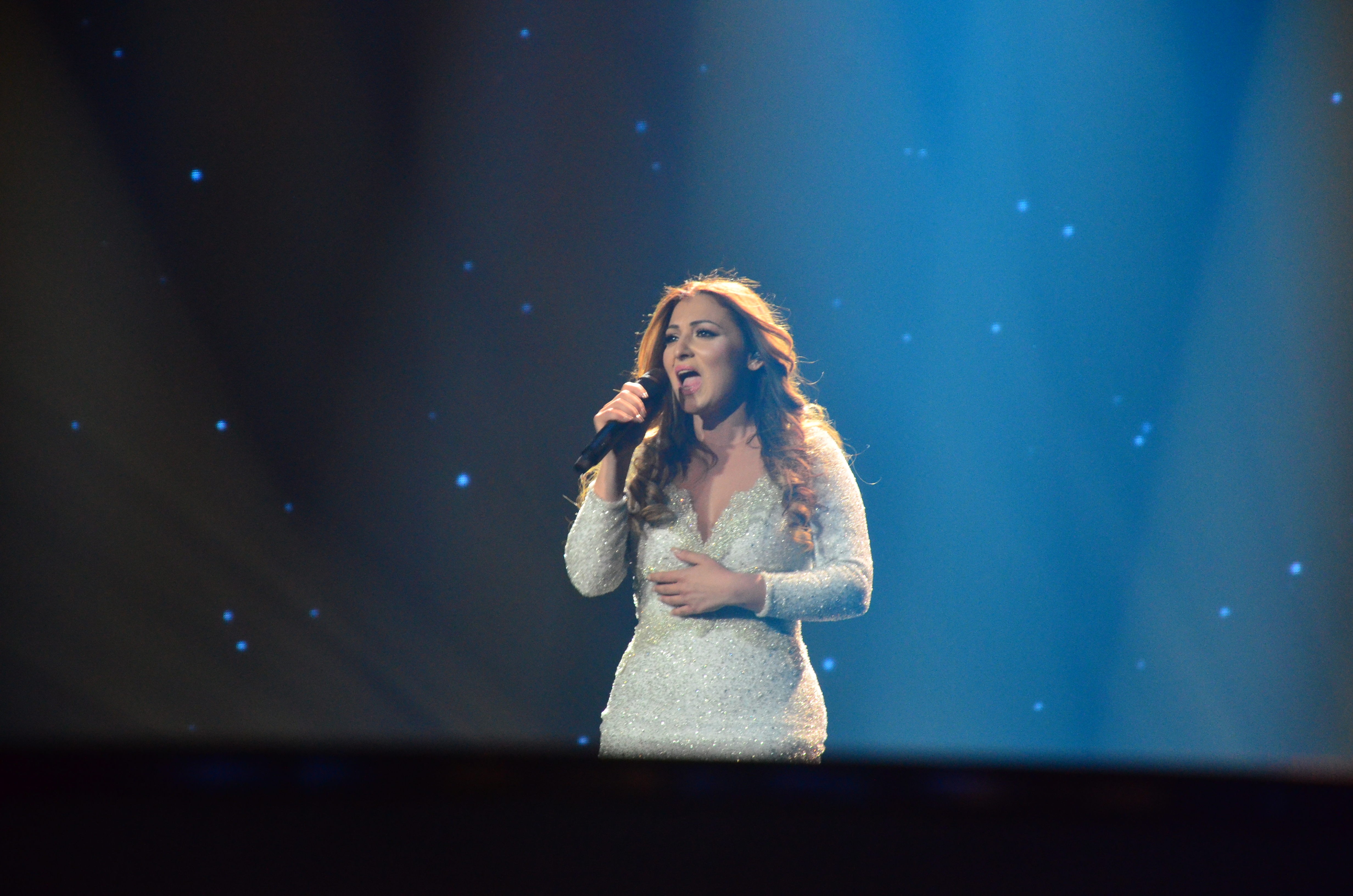 10 травня 2017 року у Києві відбулась генеральна репетиція 2 півфіналу "Євробачення".